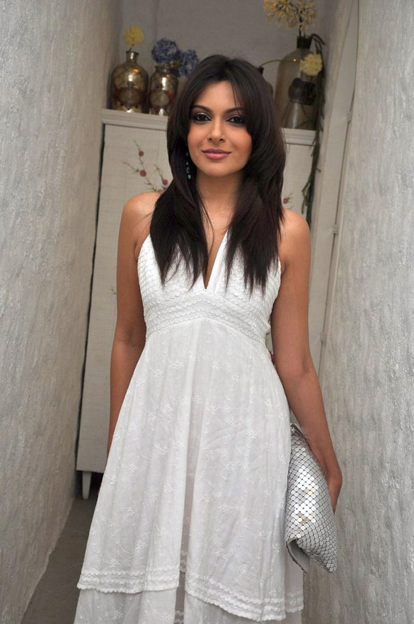 Mrinalini Sharma at Kallista Spa opening